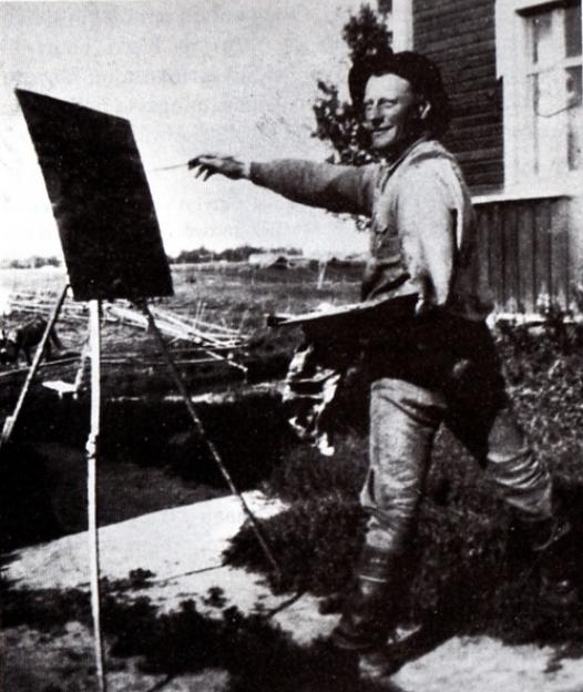 Suomalainen taidemaalari Vilho Lampi (1896-1936) maalaamassa liminkalaista maisemaa.